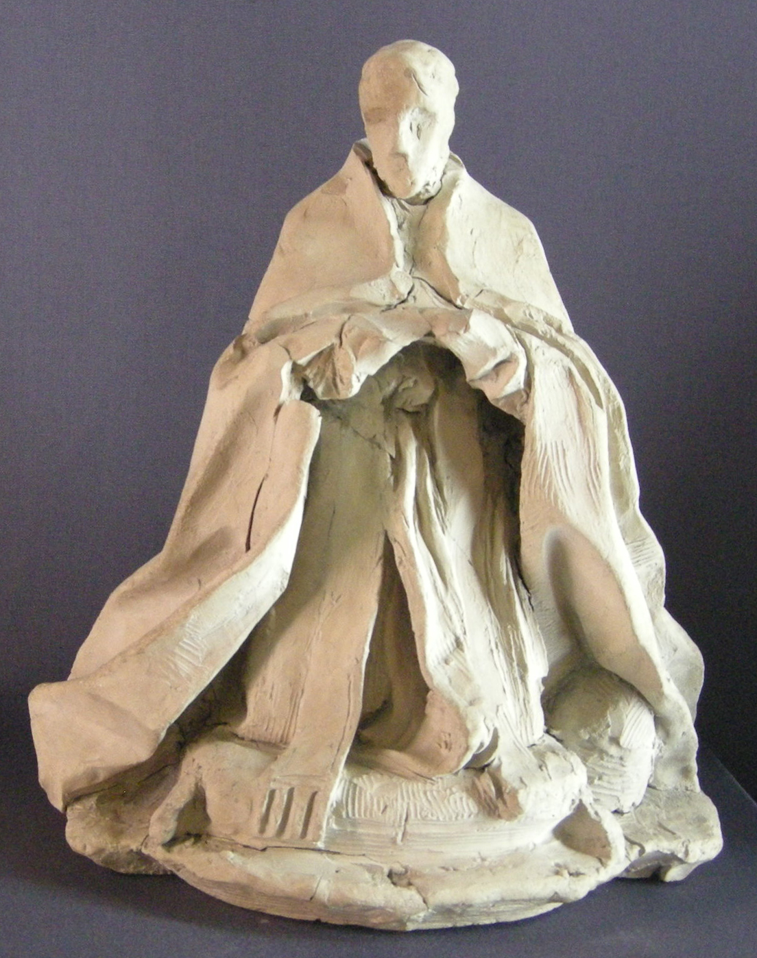 Gianlorenzo bernini, modello per il monumento a papa alessandro VII